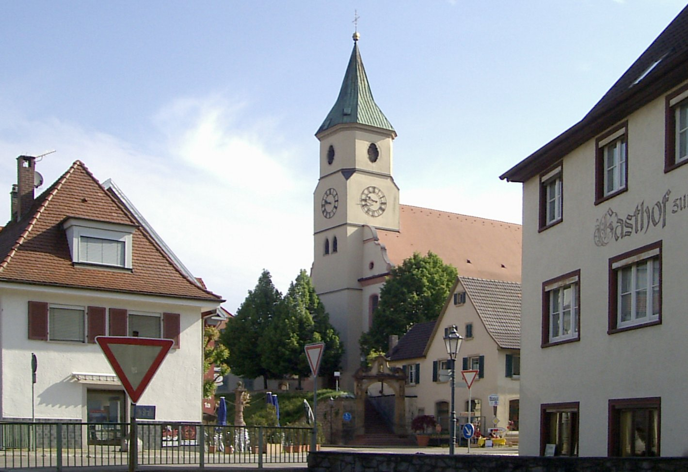 Ortszentrum Schliengen mit Blick auf die Kirche St. Leodegar